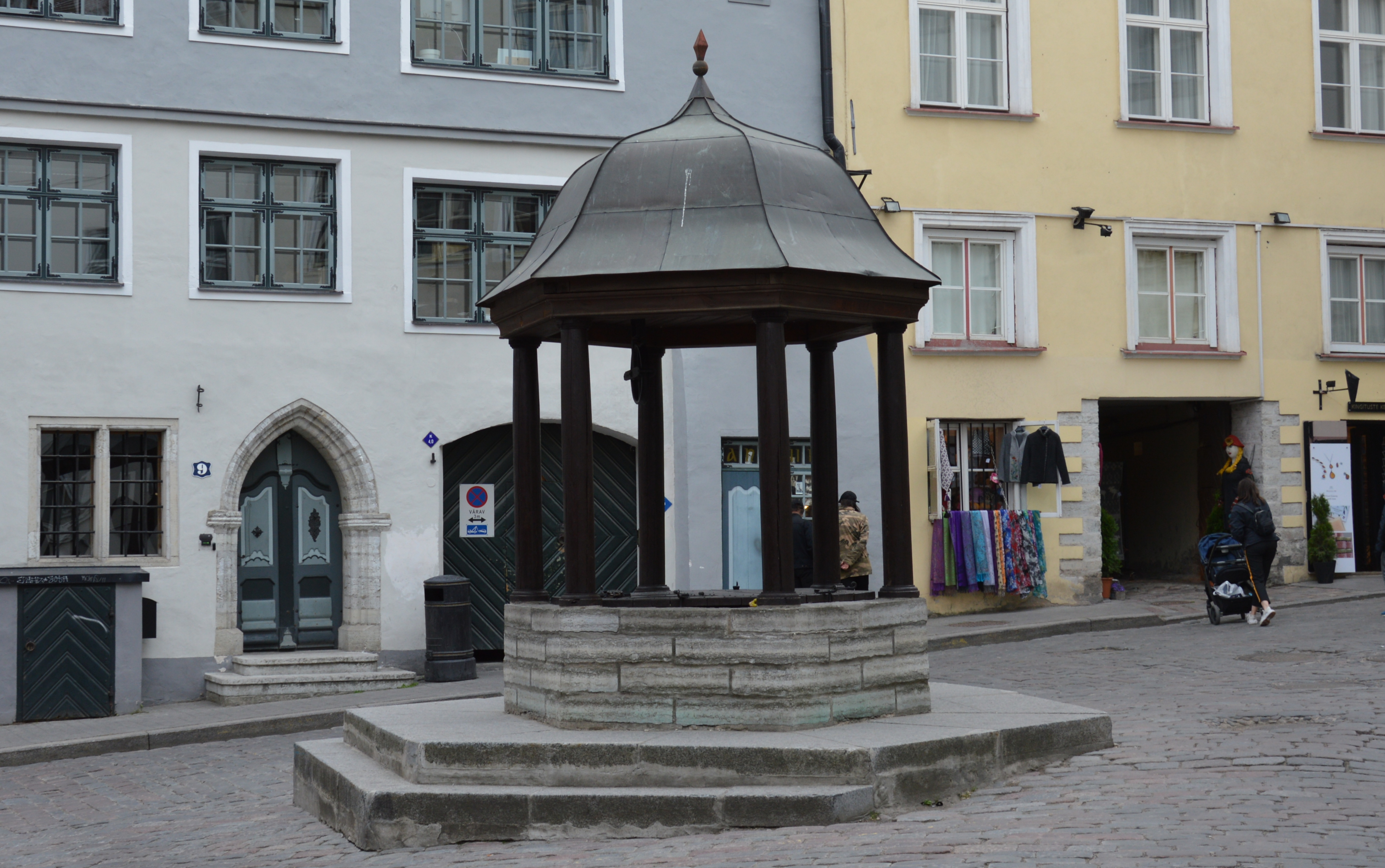 Katzenbrunnen